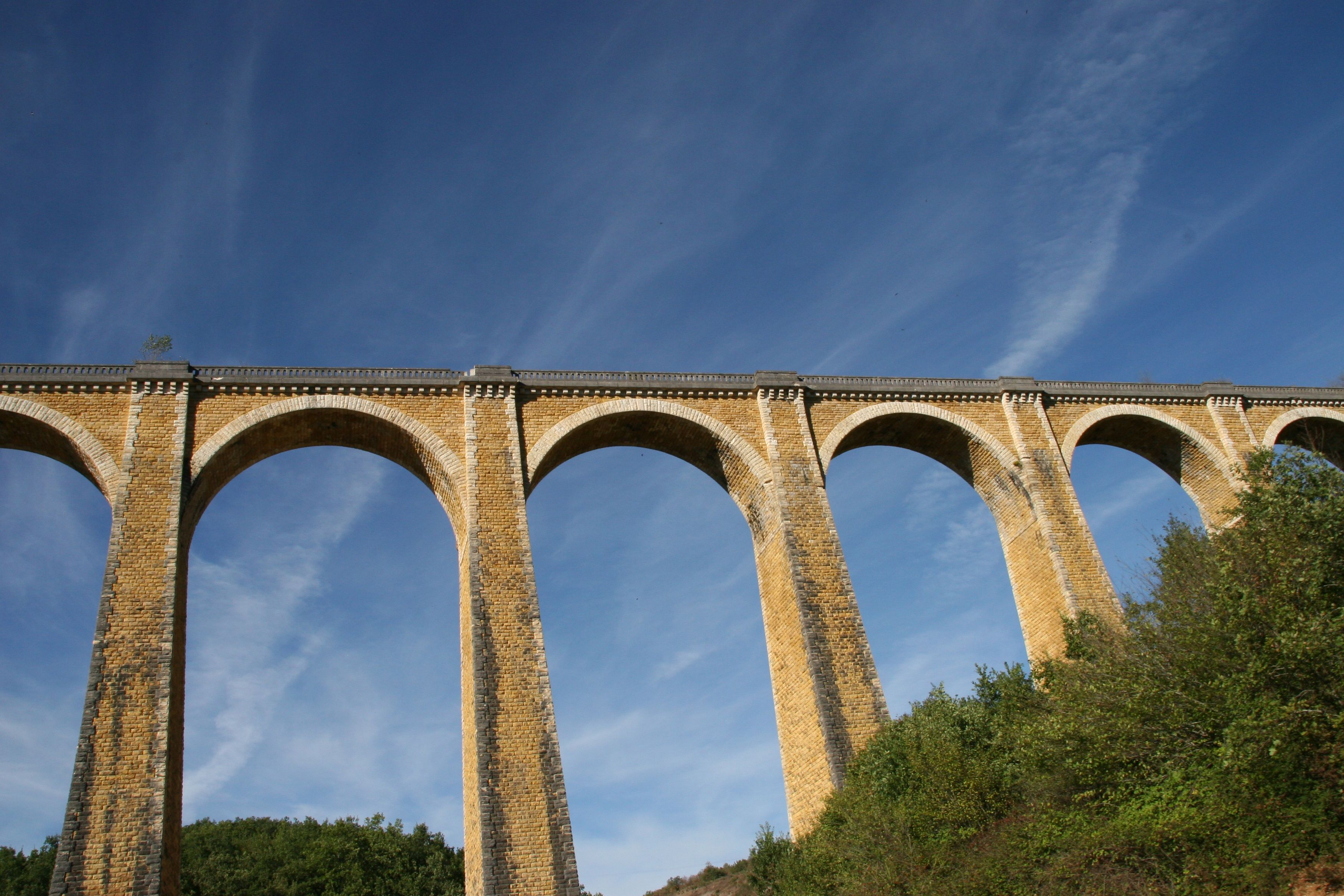 Le viaduc de Bramefond (communes de Lachapelle-Auzac et de Souillac).